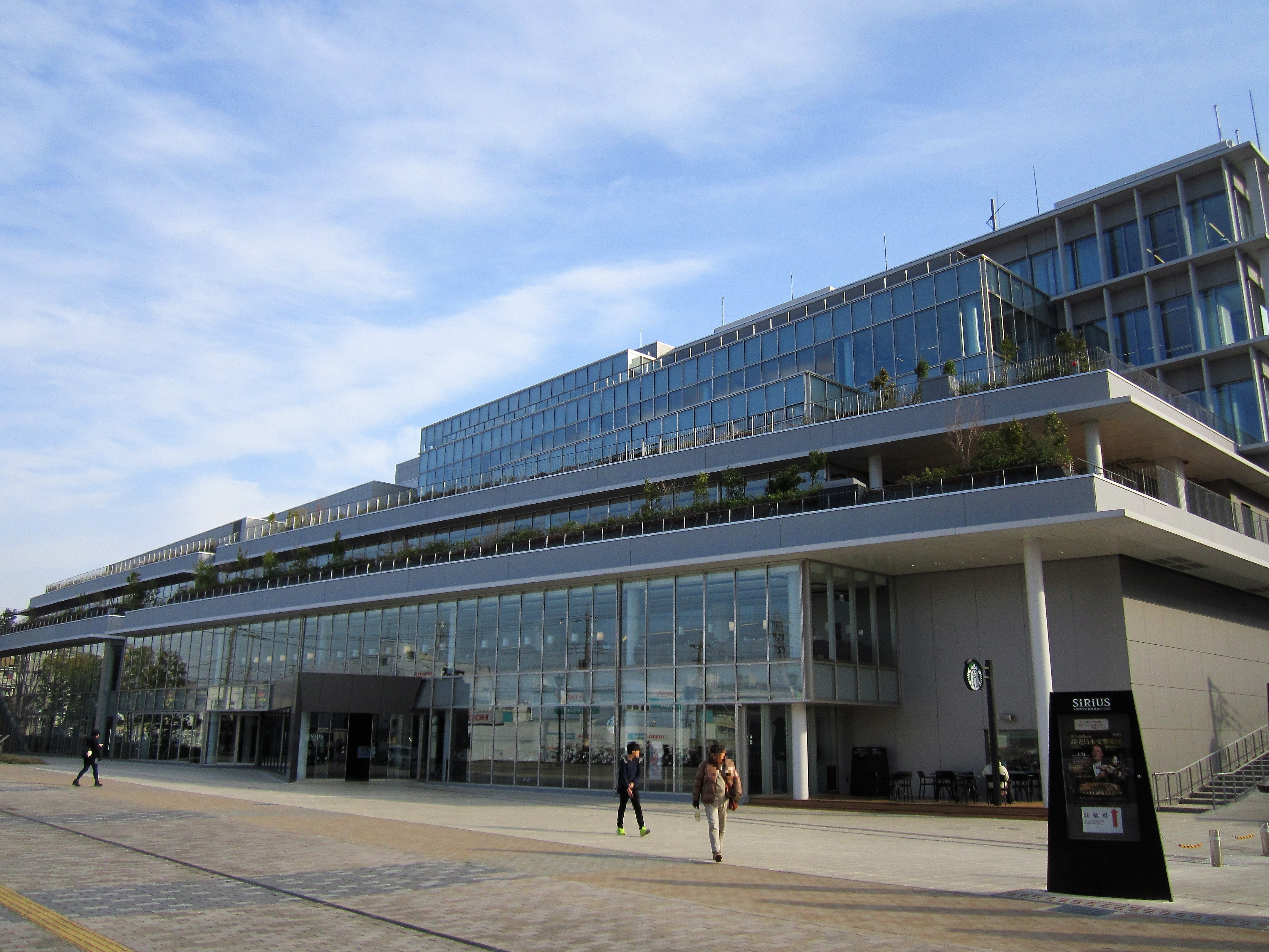 大和市文化創造拠点シリウス Canon PowerShot A2200